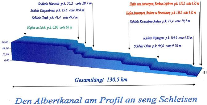 Albertkanal an Schleisen.